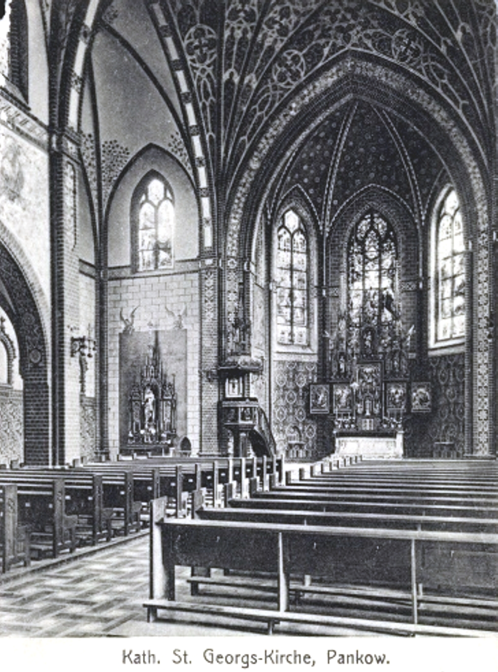 Chorapsis der St.-Georgs-Kirche um 1918 (Jahr aus der alten Briefmarke abgeleitet)